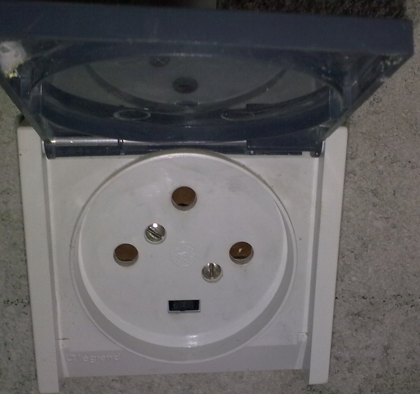 Prisé triphasé Legrand 400 V, 3 x 32 A avec clapet de protection.